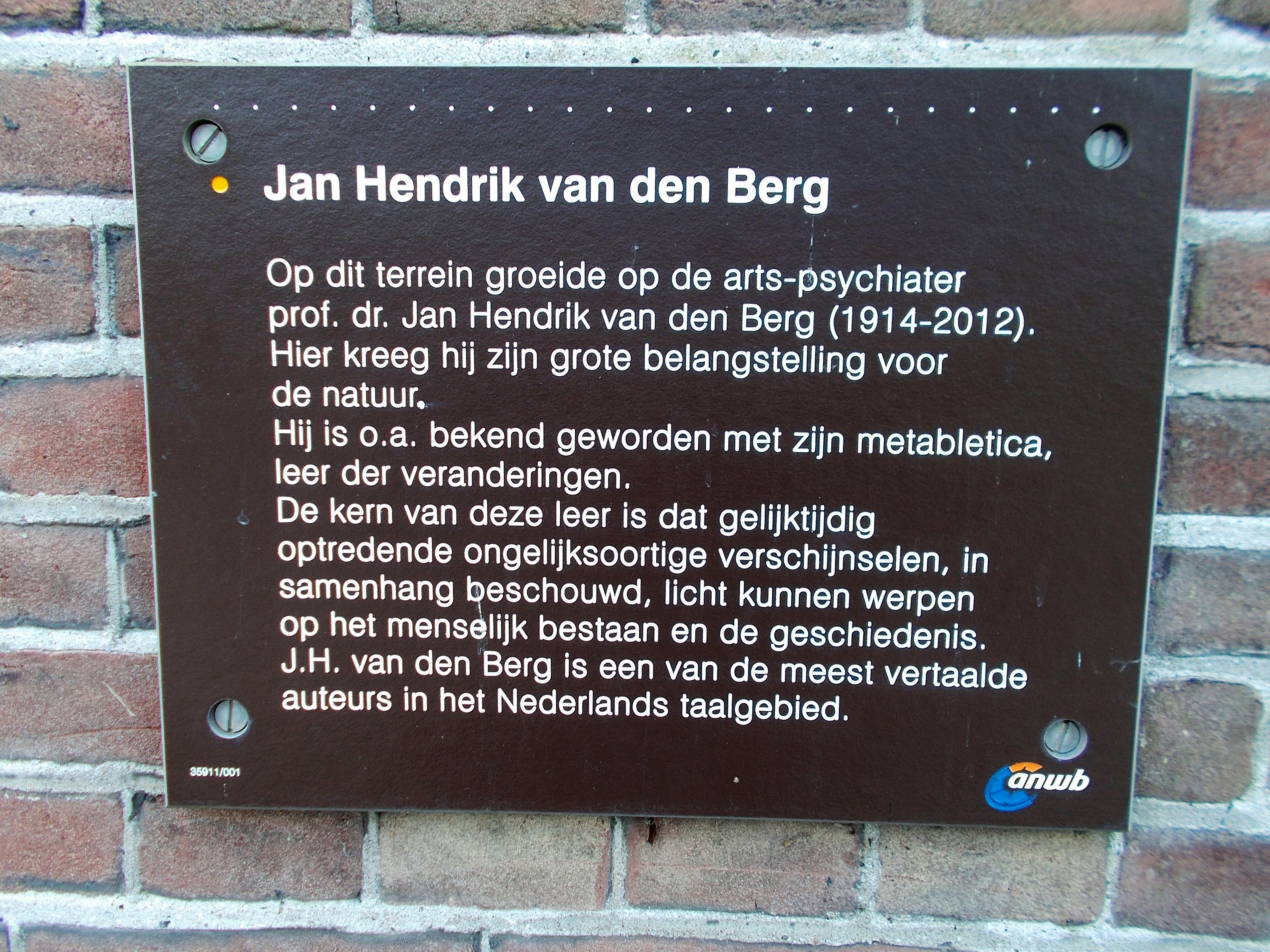 Informatiebord op de plek waar de geleerde en schrijver J.H. van den Berg opgroeide. In 2016 geplaatst door de ANWB bij het drinkwaterpompstation in het Nieuwe Plantsoen aan de Ceintuurbaan te Deventer.